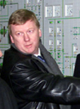 Anatoly Chubais